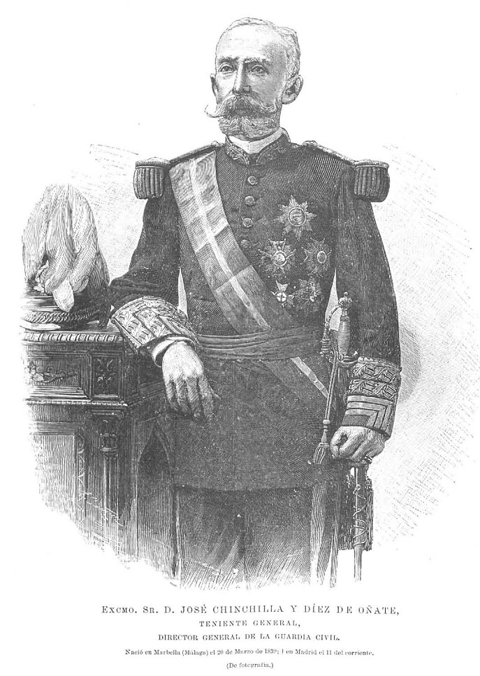 Retrato de José Chinchilla, recogido en la revista española La Ilustración Española y Americana en 1899.